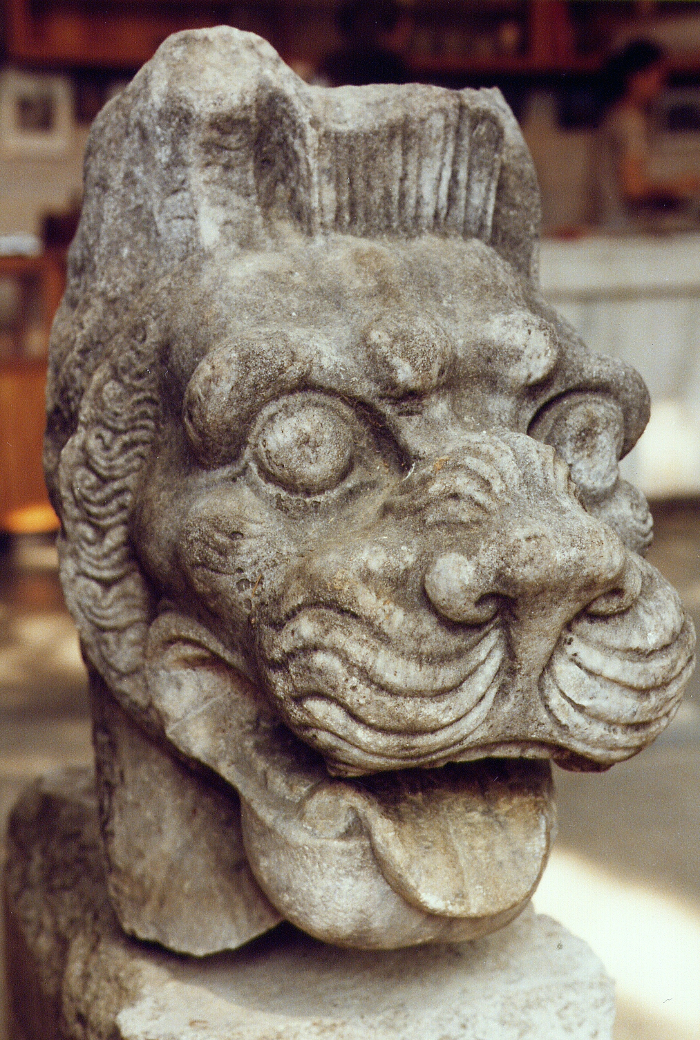 Löwenkopf vom Mausoleum von Belevi, Ephesus-Museum Selçuk